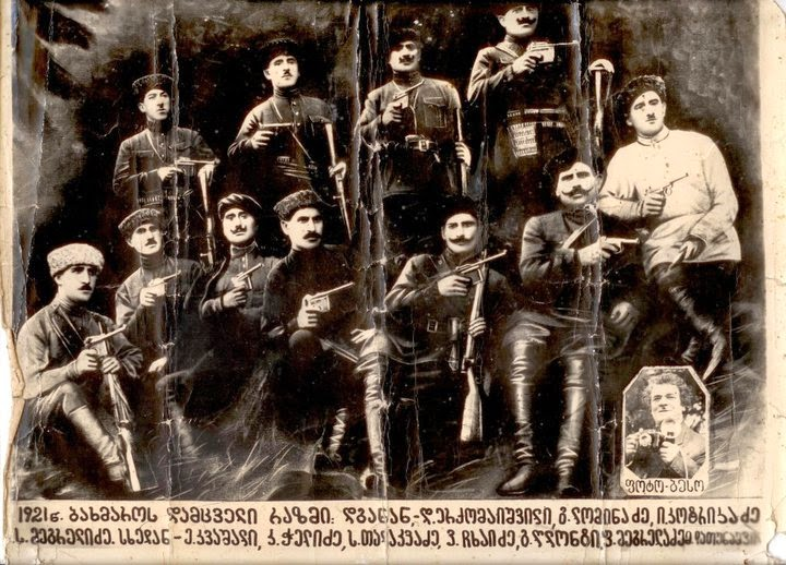 გოგია ღლონტი და ბახმაროს დამცველი რაზმი